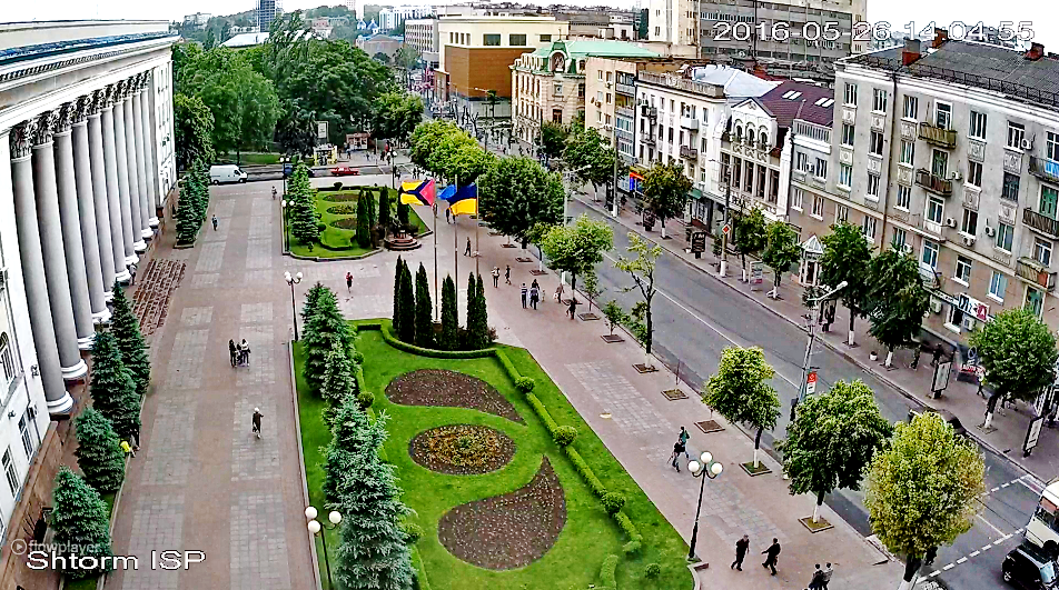 Зняток із трансляції веб-камери, встановленої на площі перед міськрадою Кропивницького